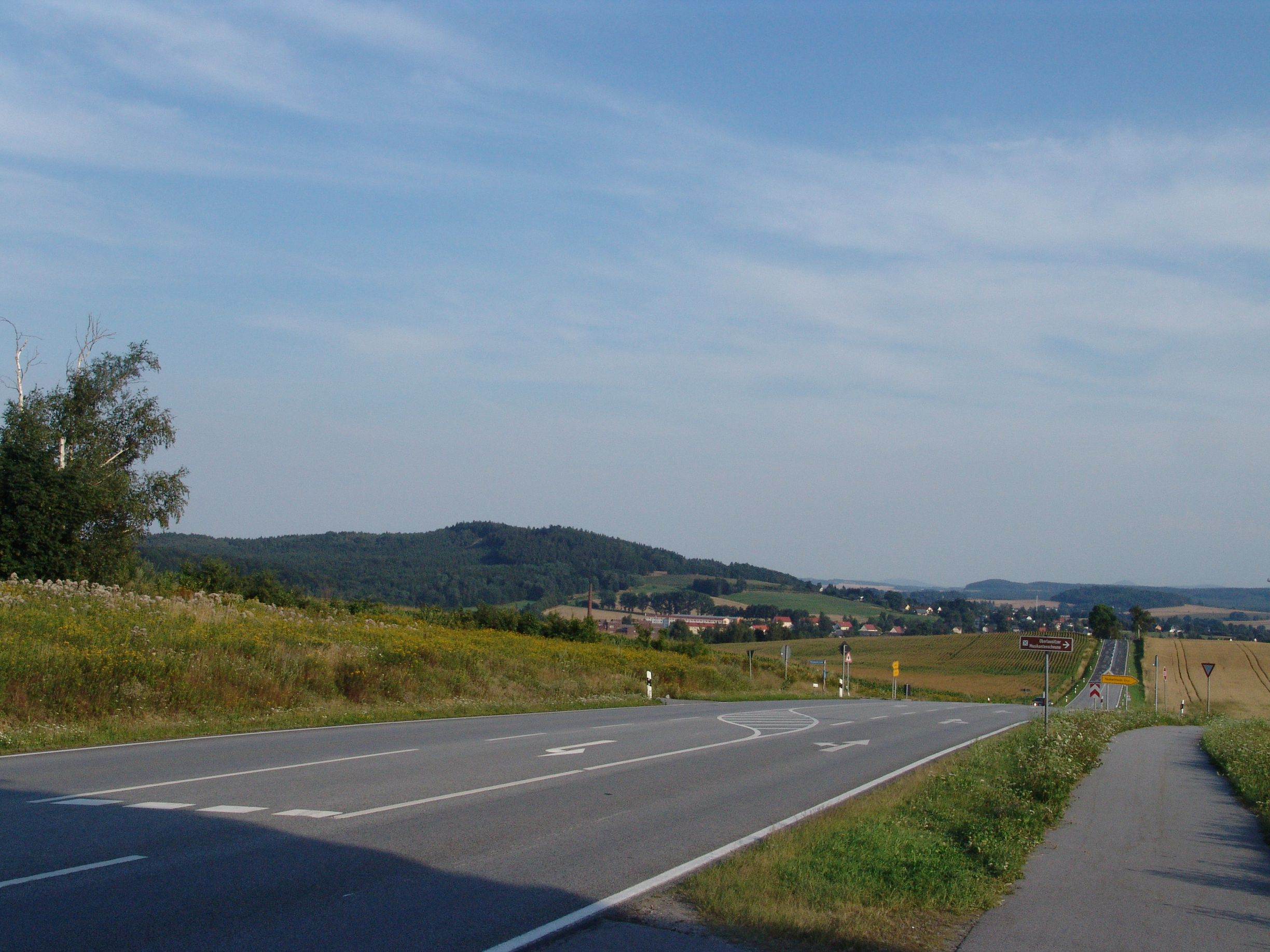 Großer Wald in Oppach von der Erntekranzbaude aus gesehen